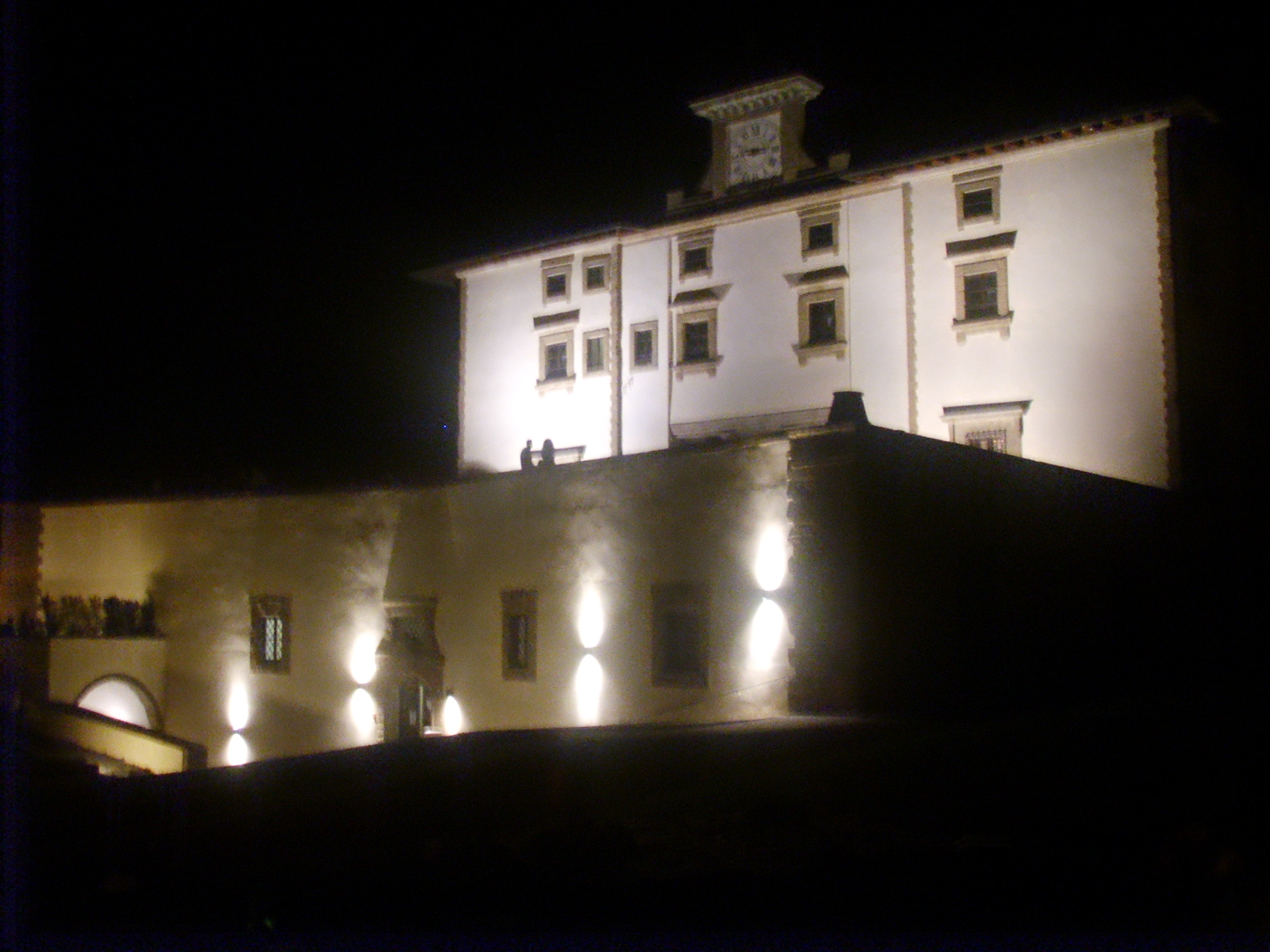 Forte_Belvedere by night